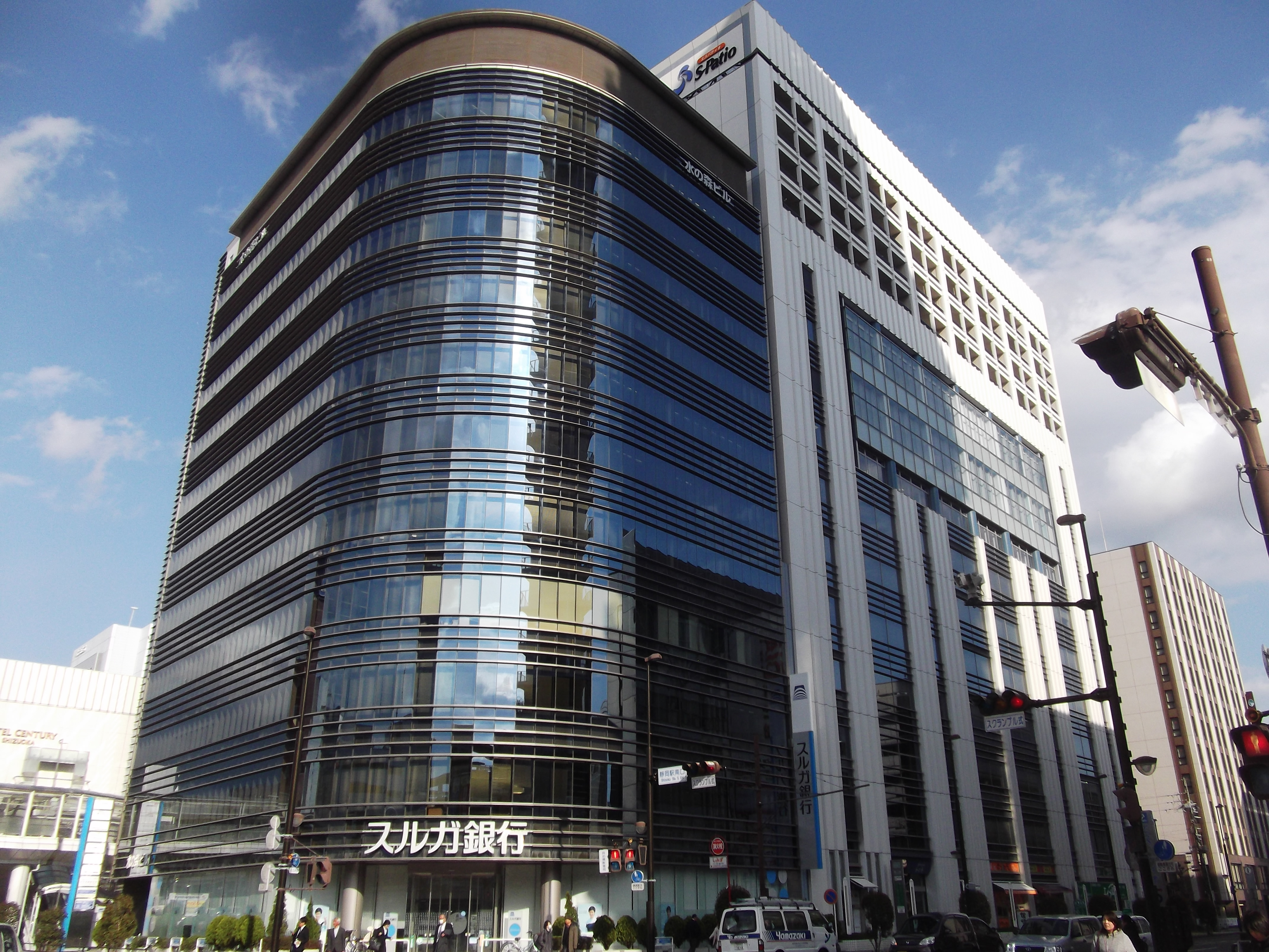 水の森ビルとエスパティオ。